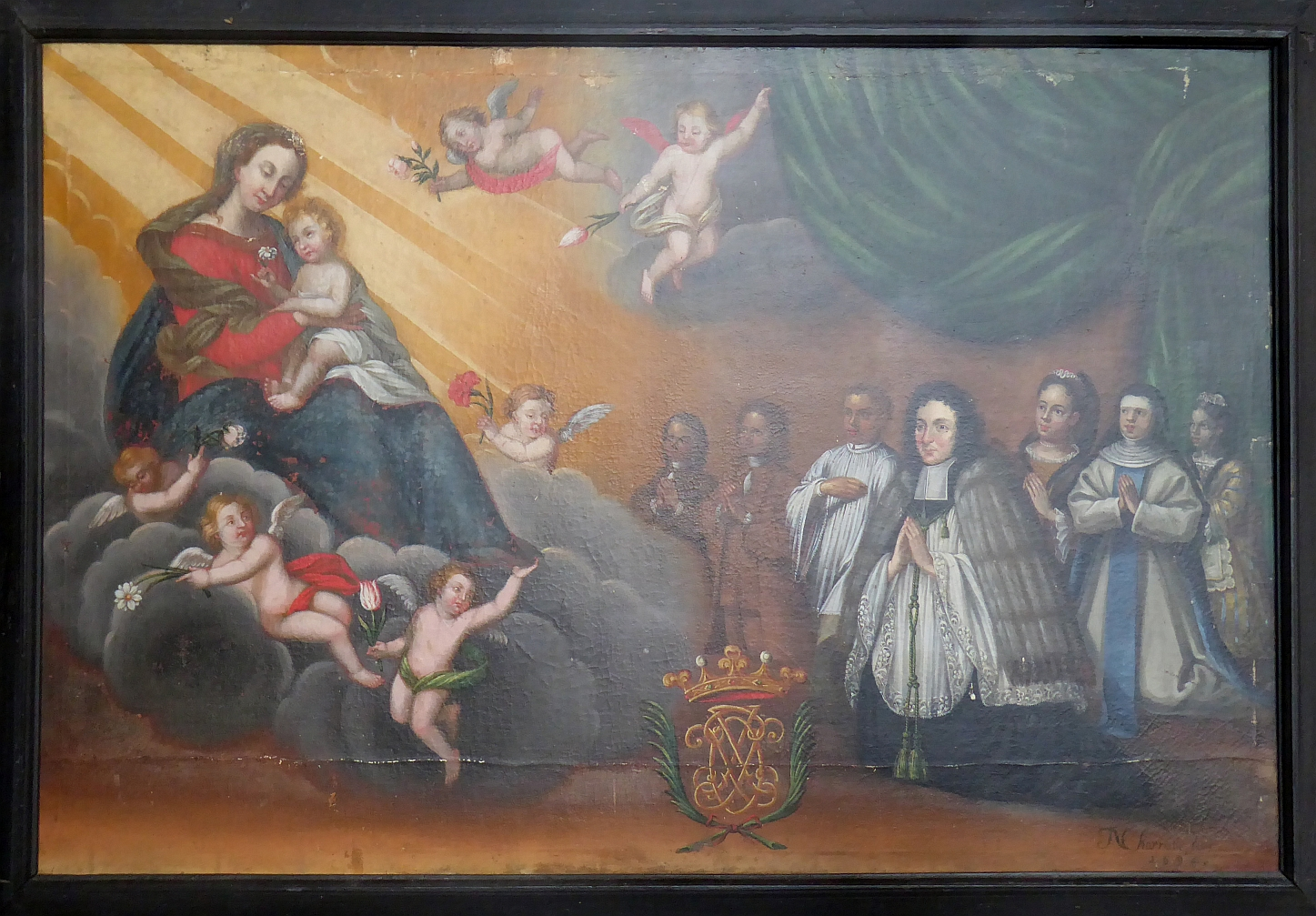 Maria mit Gläubige, Gemälde, Chapelle du Vorbourg